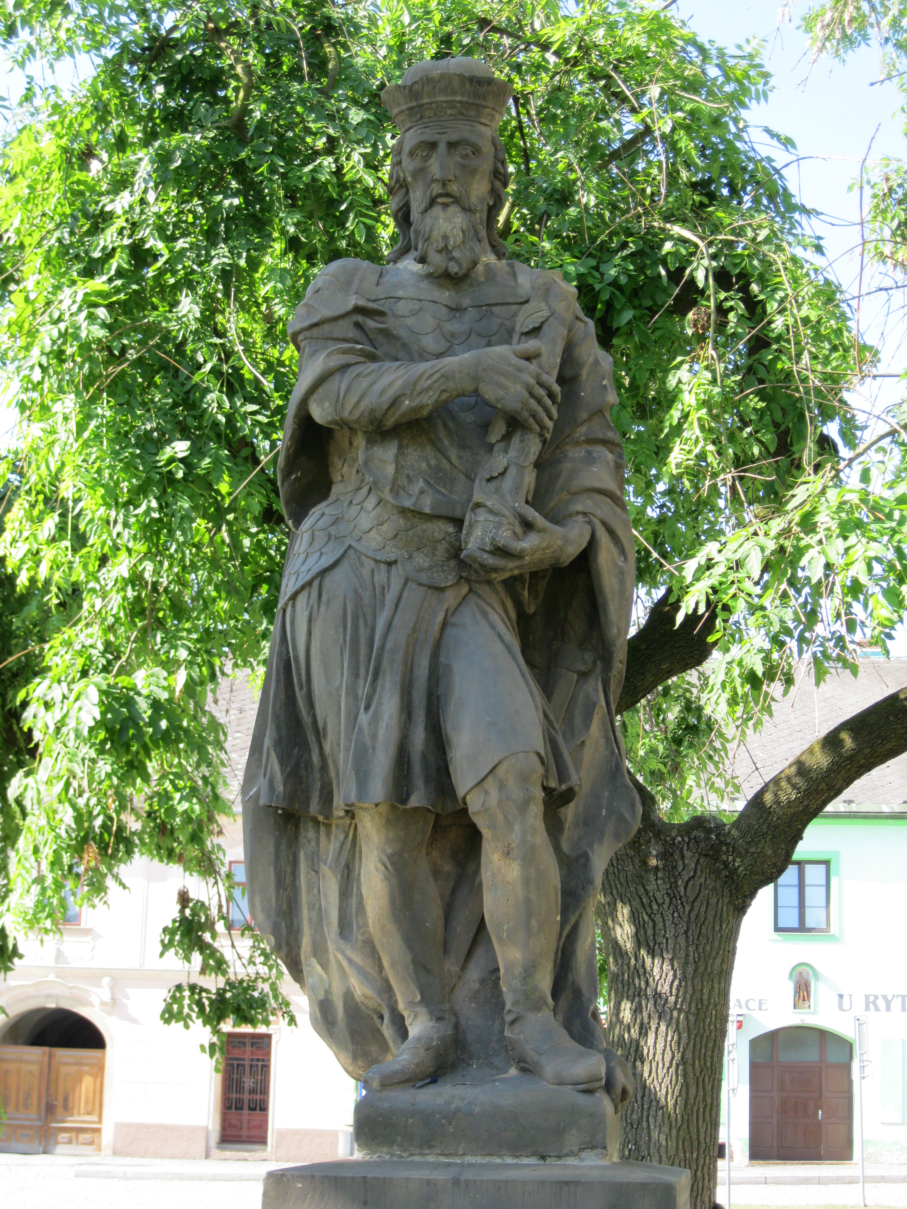 Kašna se sochou Svatopluka (Loštice), nám. Míru, Loštice